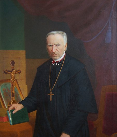 Vojtěch Ruffer (1790 – 1870), kanovník Vyšehradské kapituly